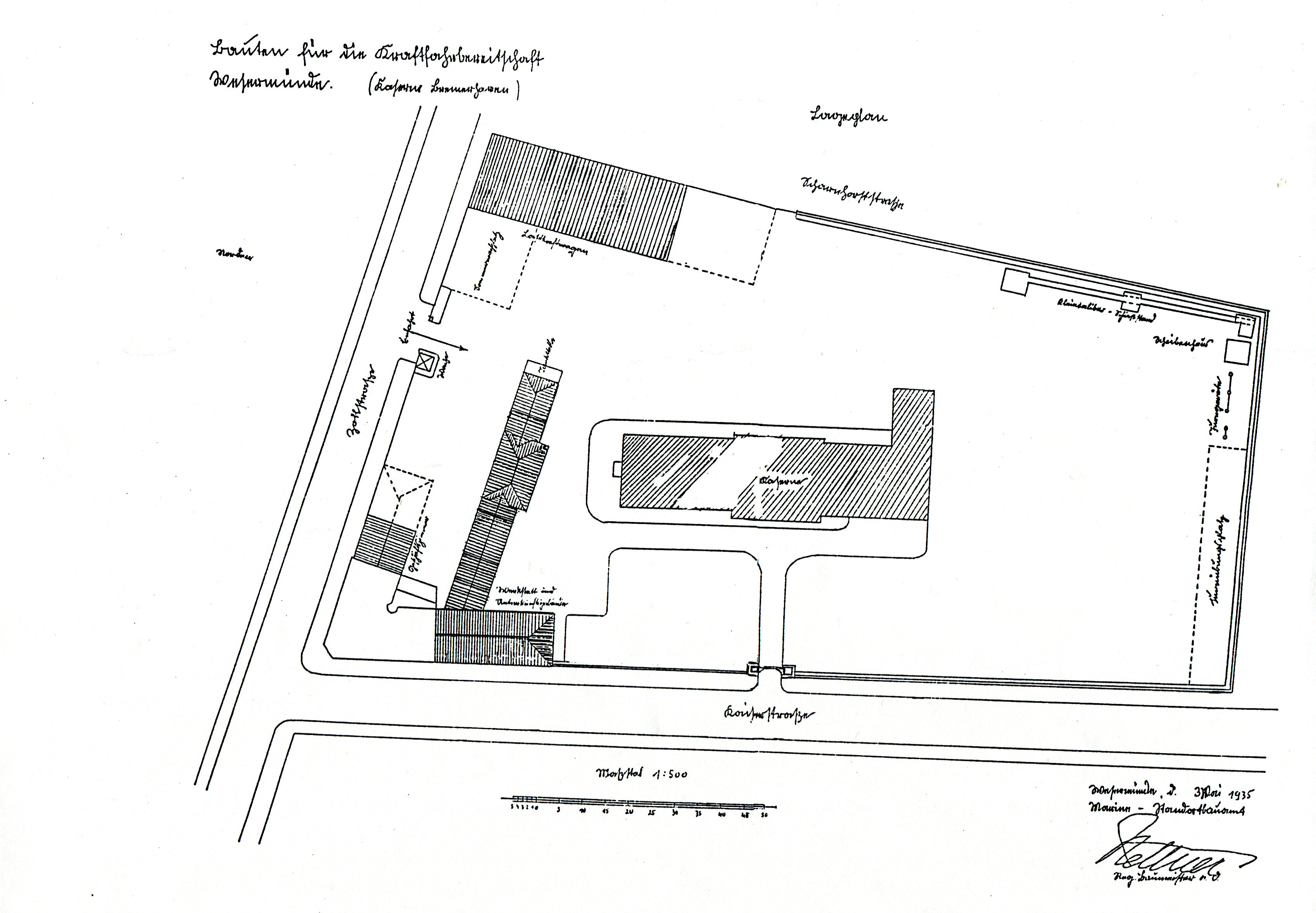 Grundriss der Kaserne Roter Sand, Bremerhaven-Lehe